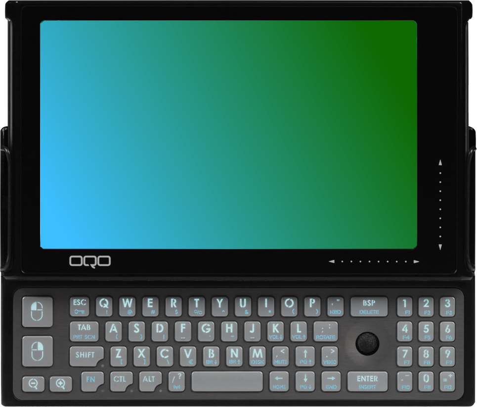 OQO Model e2.OQO model 02